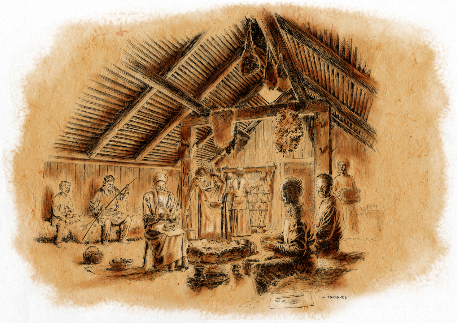 Interiøret i et typisk langhus fra folkevandringstiden/vikingtiden